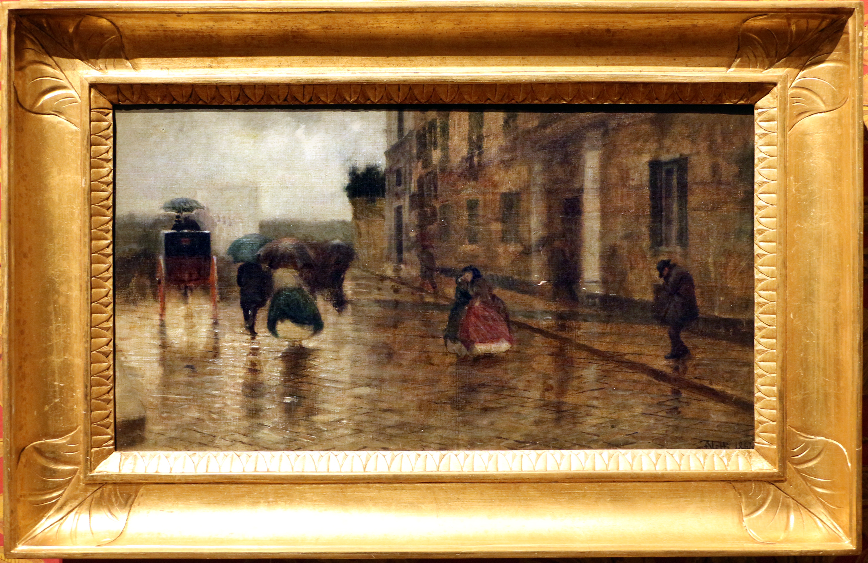 la pioggiatitle QS:P1476,it:"la pioggia" label QS:Lit,"la pioggia"